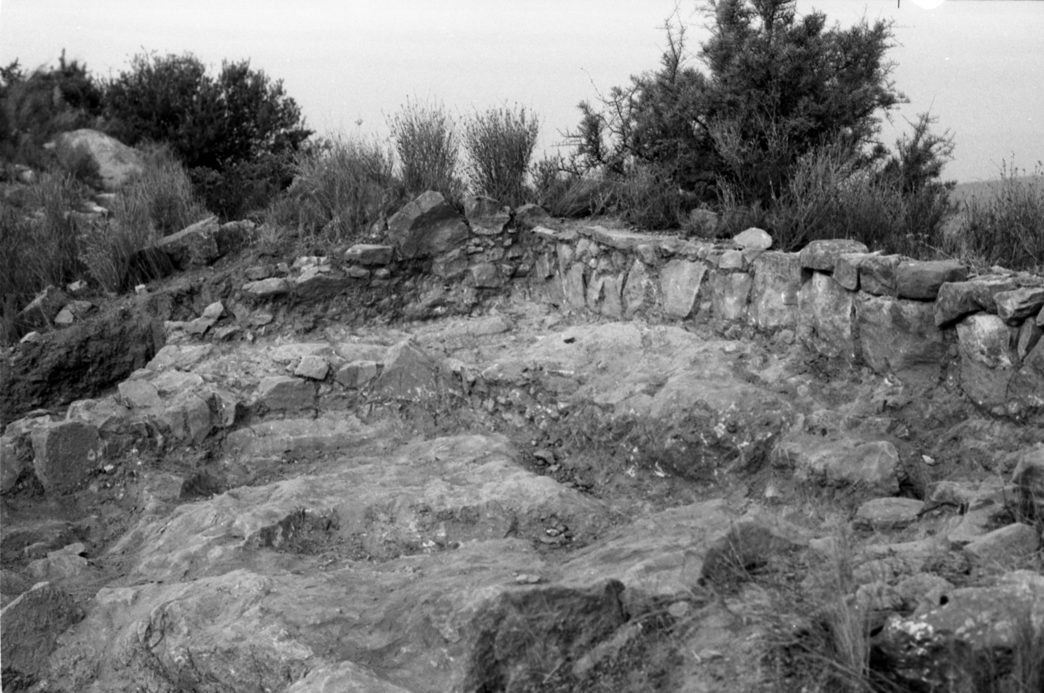 Imatge de l'excavació realitzada per Rosa Enguix Alemany en 1977.